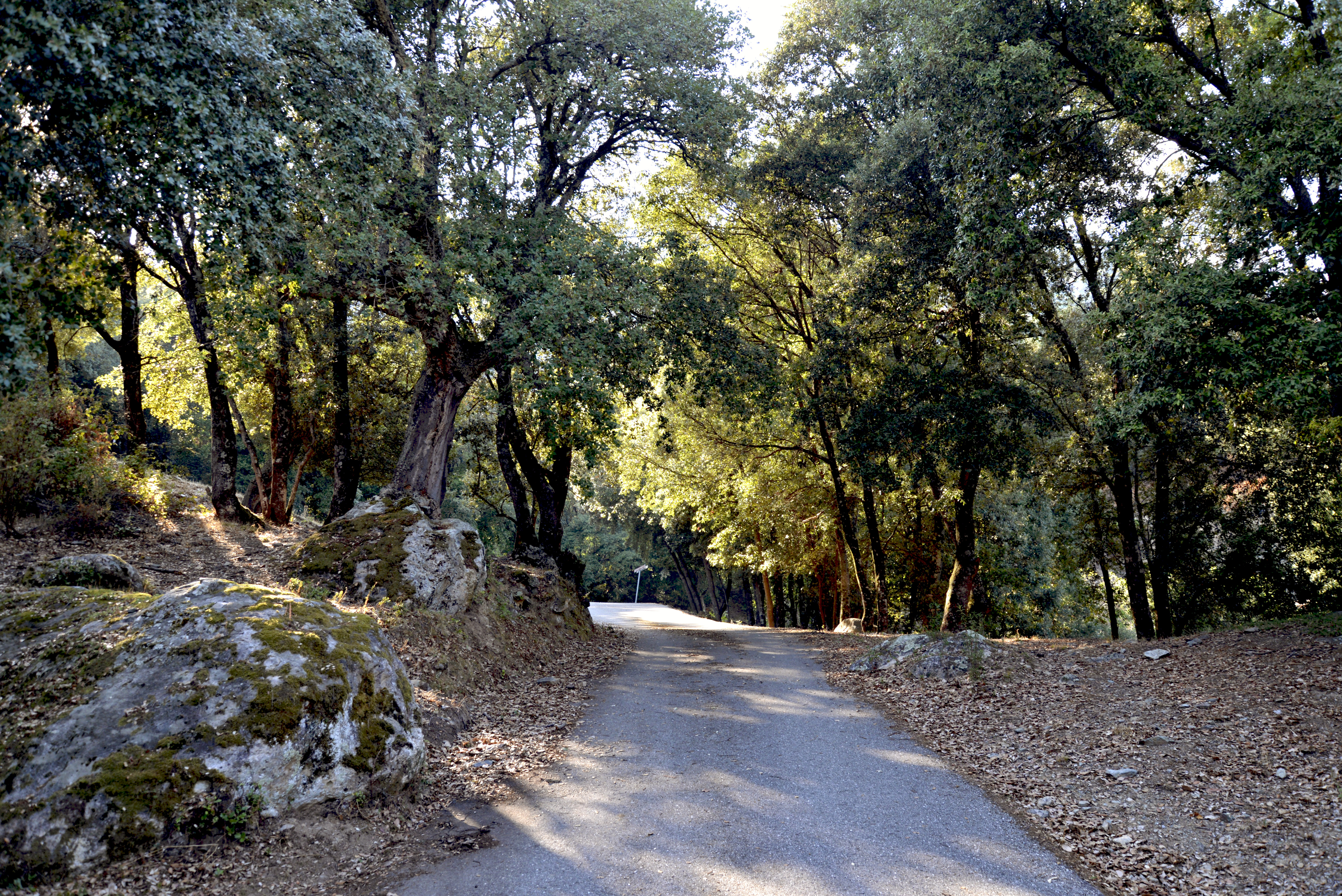 Castirla, Talcini (Haute-Corse) - Dans la chênaie sous le village (chêne vert, chêne liège)